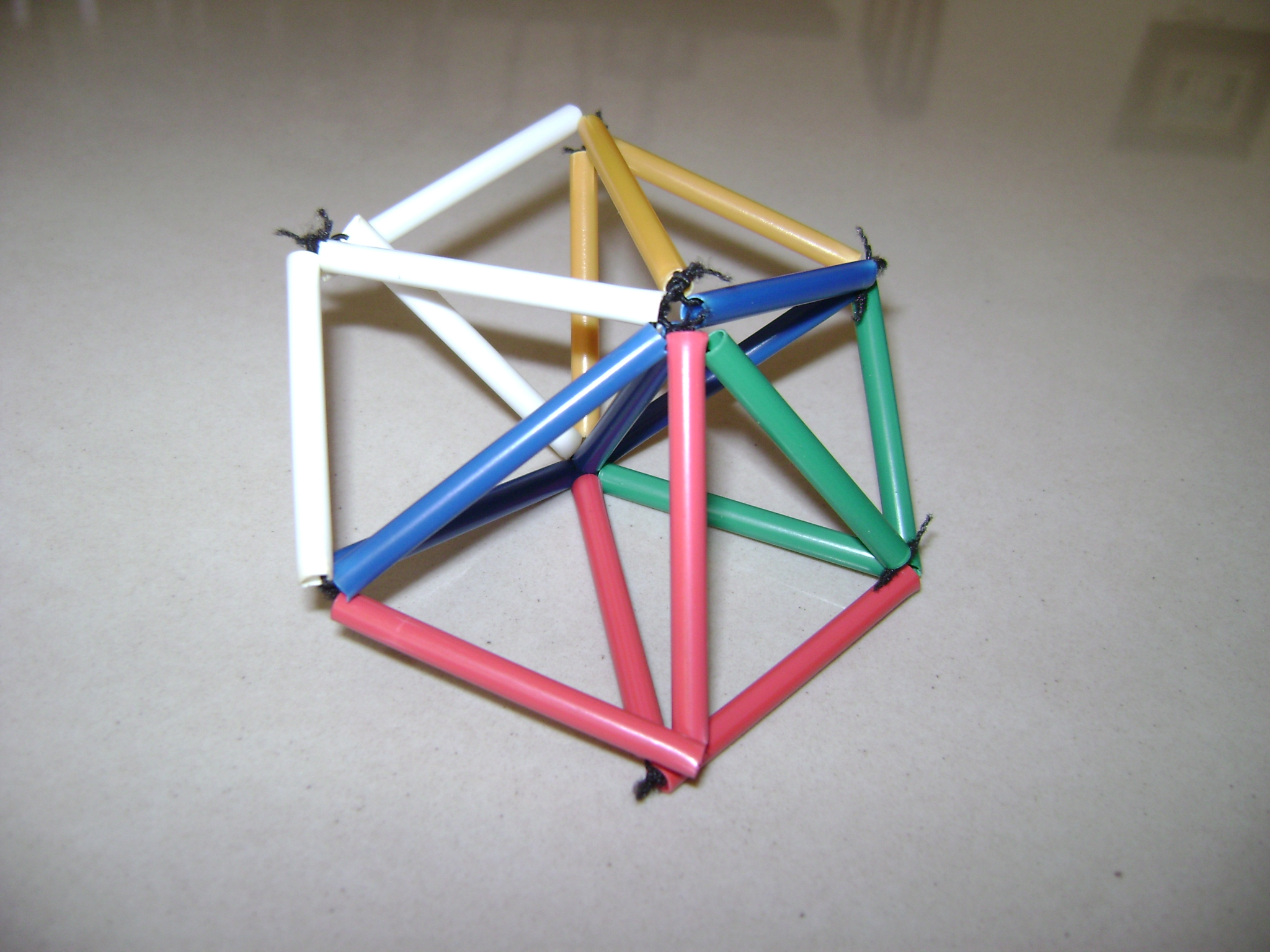 Bipirâmide hexagonal feito com elástico e canudos.